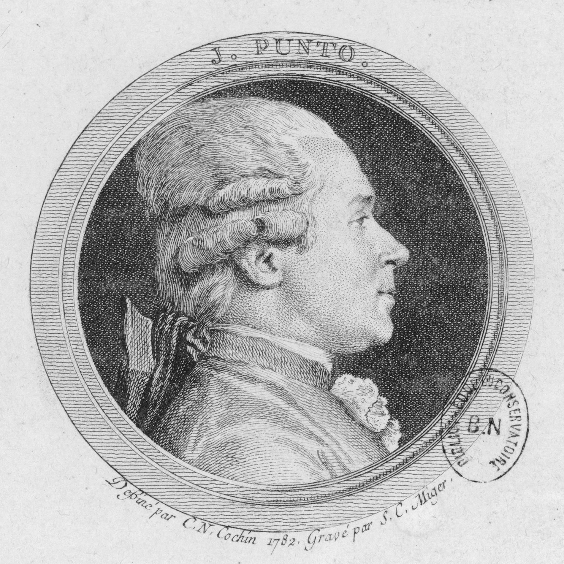 Depicted person: Giovanni Punto